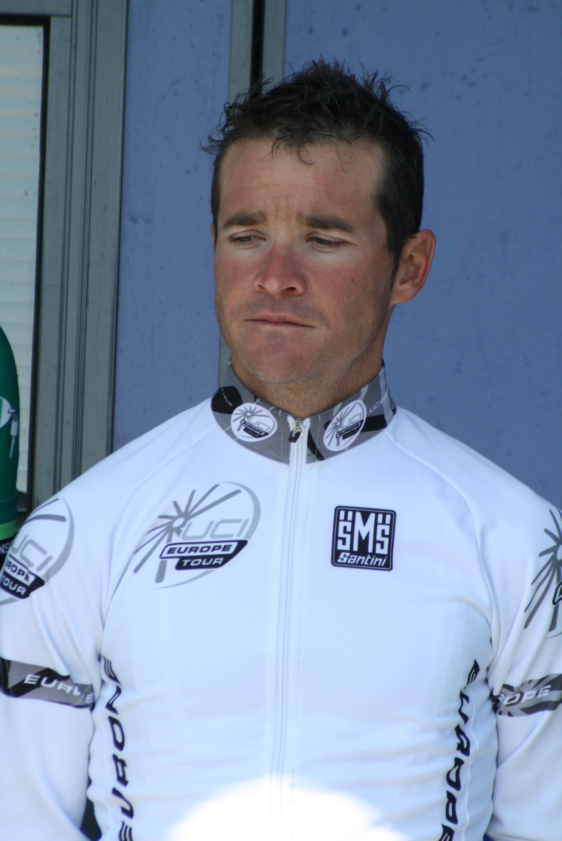 Présentation des coureurs au départ de la première étape Thomas Voeckler